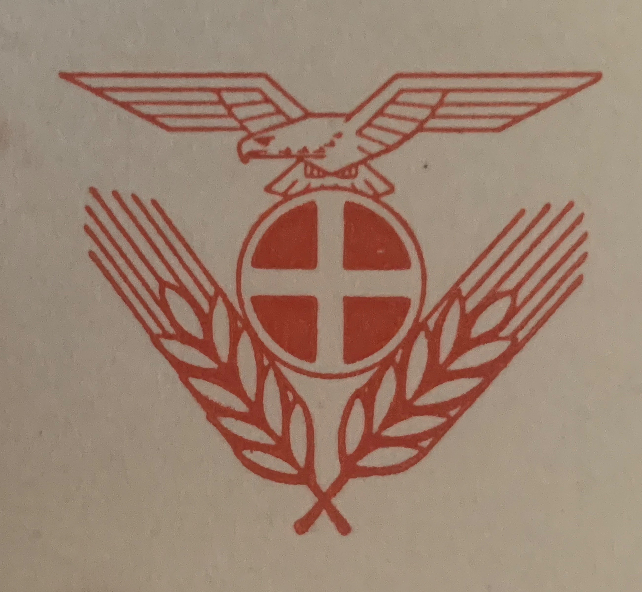 Emblem for Norges Bondesamband med NS-ravn på solkors over to kornaks. Sammenslutningen var landbrukssektorens representant i Nasjonal Samlings korporative samfunnsmodell under andre verdenskrig.